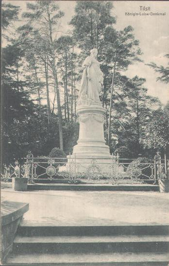 Königin Luise-Denkmal in Tilsit, von Gustav Eberlein